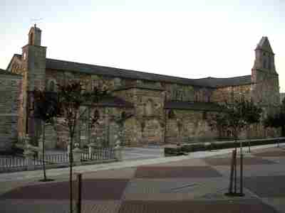 Lateral da colexiata de Sta. María en Meira. Uploaded by User:Agremon